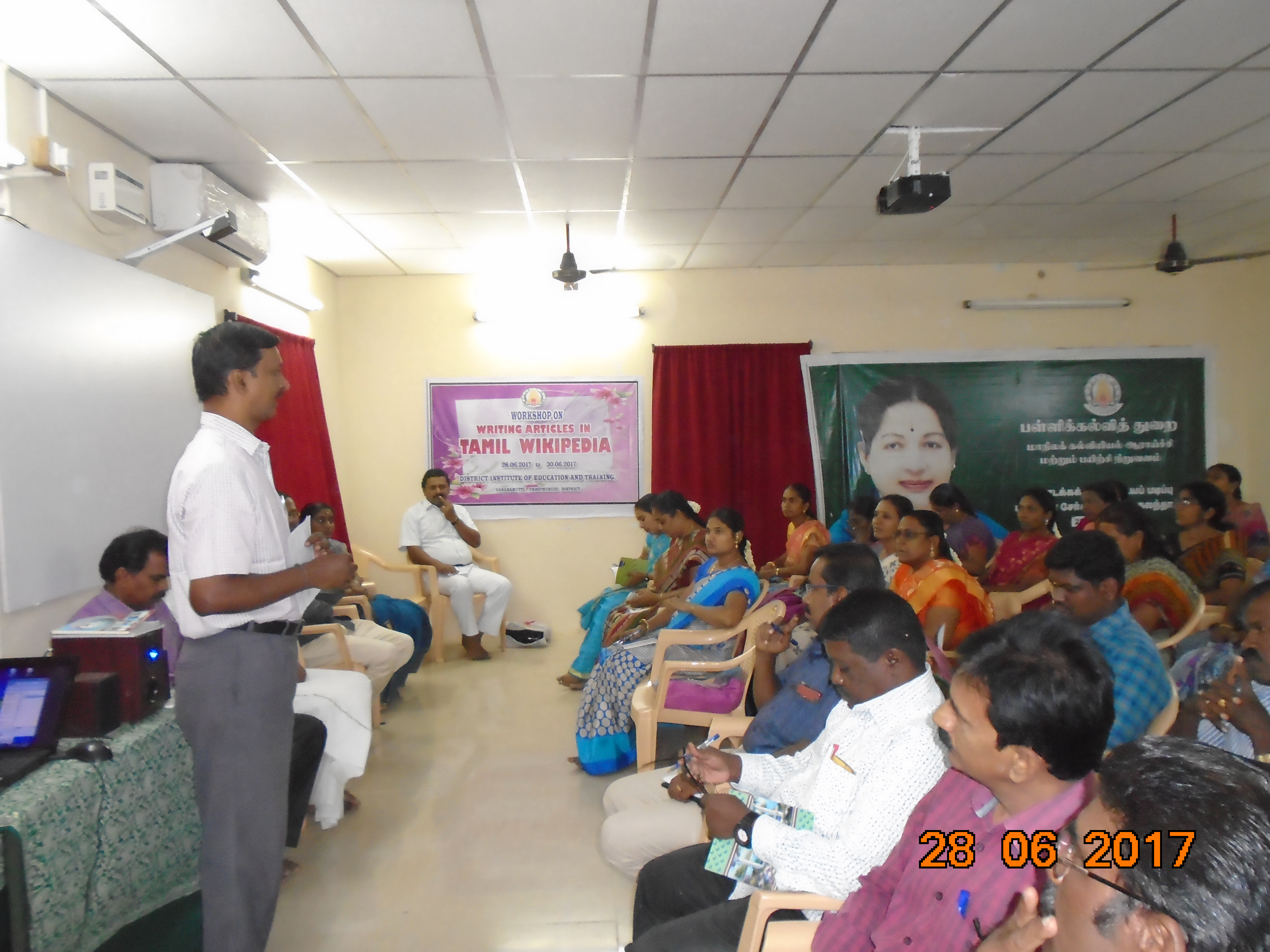 தமிழ் விக்கிப்பீடியா பயிற்சி - துாத்துக்குடி மாவட்டம் வானரமுட்டி.